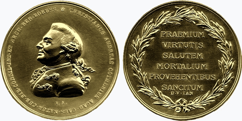 Медаль Котениуса, Cothenius-Medaille